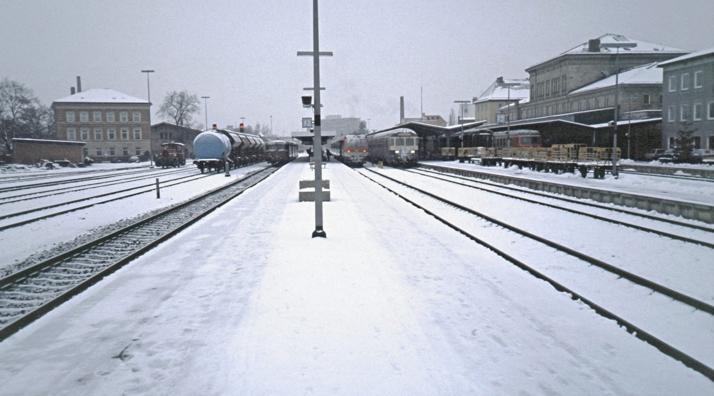 Hauptbahnhof Bayreuth (Scan von Dia)